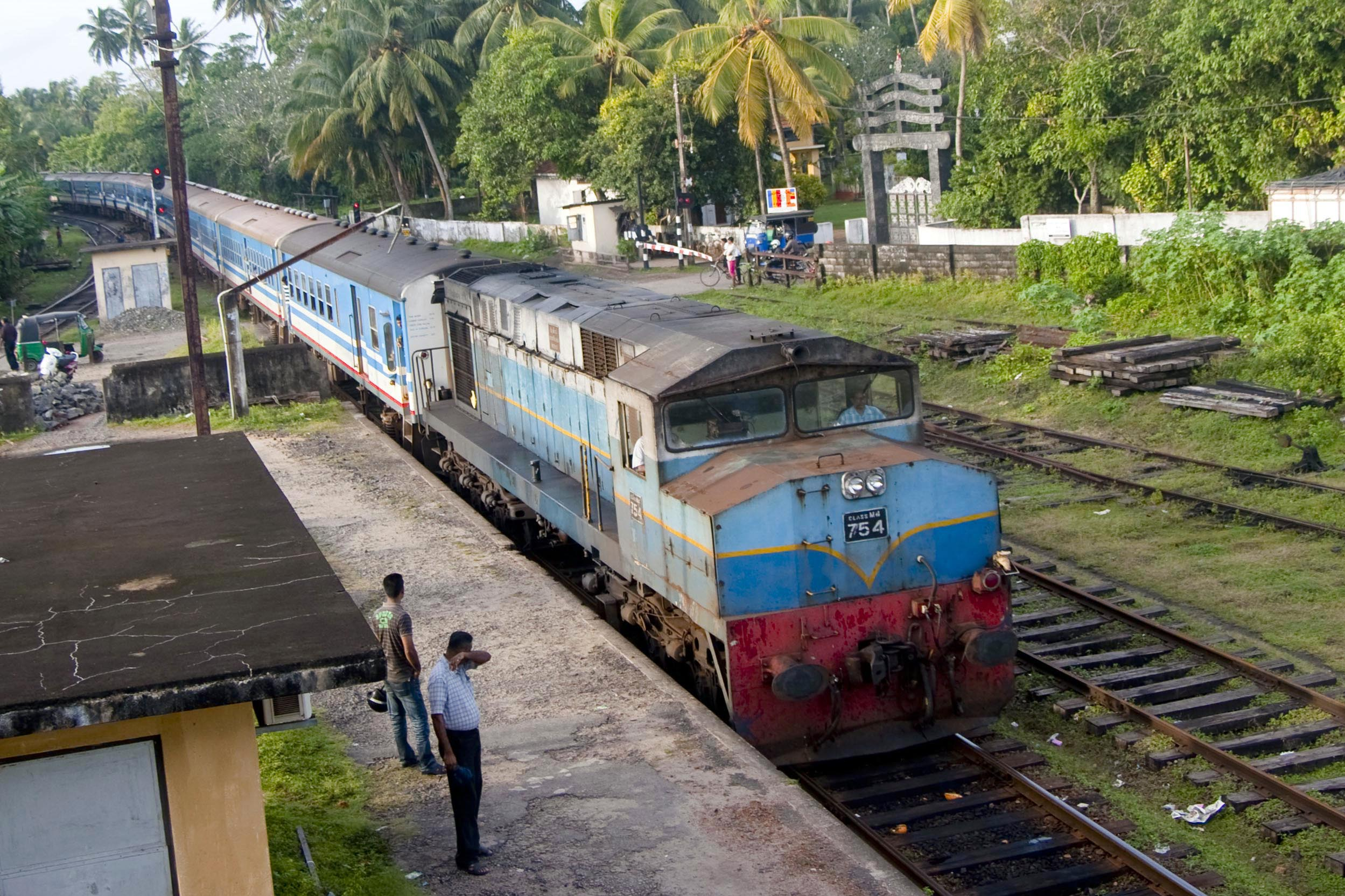 'Ruhunu Kumari' Express train at Aluthgama